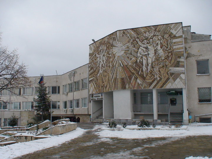 сградата на Общинска администрация Никола Козлево